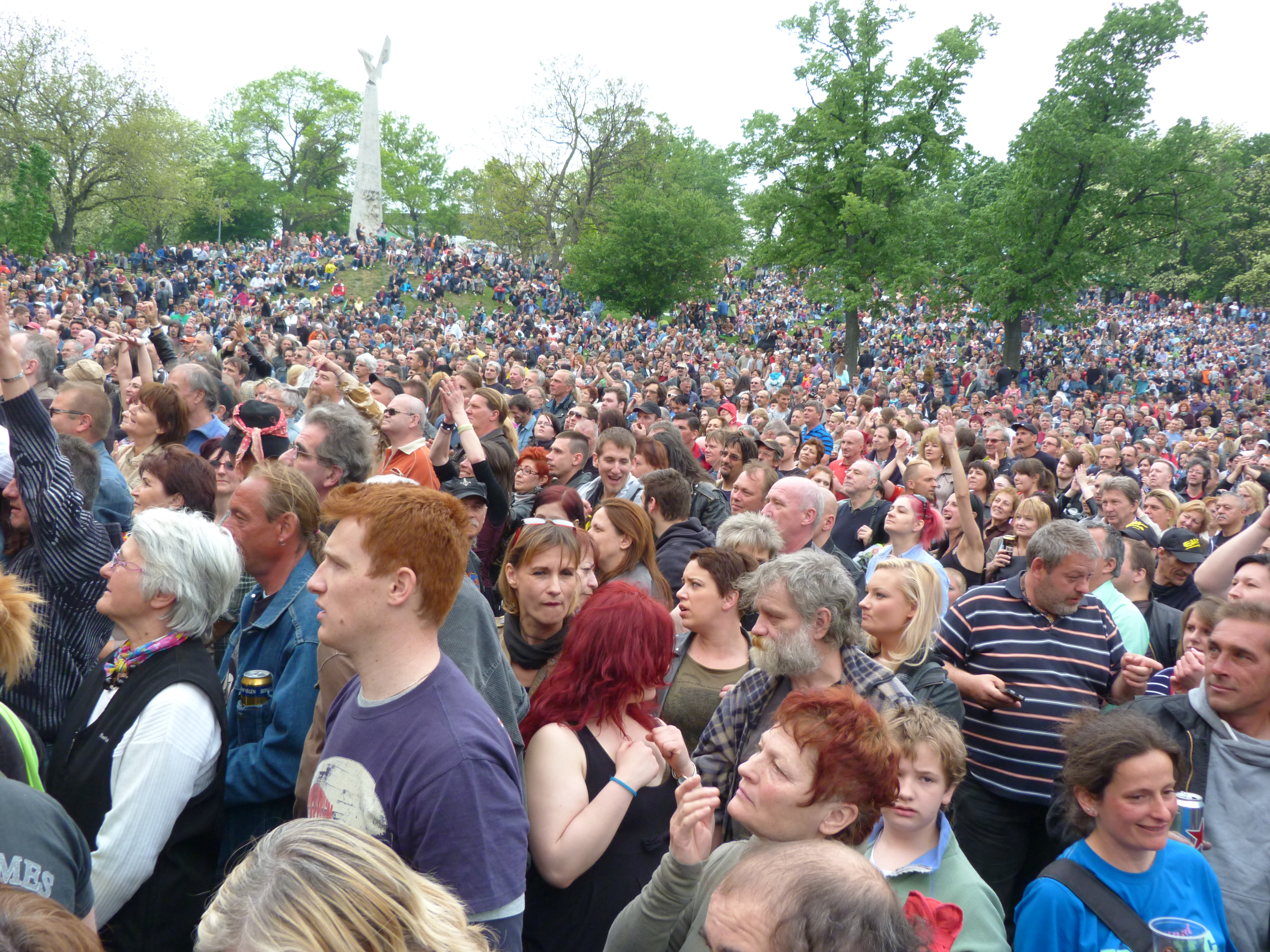 A felvétel 2015. május 1-én pénteken készült Budapesten, a Tabánban. Tabán Fesztivál. Mobilmánia együttes. ©© Derzsi Elekes Andor, Budapest, 2015, A fénykép másolását és felhasználását a szerző ellenérték nélkül megengedi. Az engedély kiterjed a kereskedelmi célú hasznosításra is. Kéri azonban nevének feltüntetését a felhasználás során. A Metapolisz sorozat valamennyi képe és filmje Creative Commons alatti. kereskedelmi - for profit - célra is felhasználható. Ajánlott hivatkozás: Derzsi Elekes Andor: Metapolisz DVD line